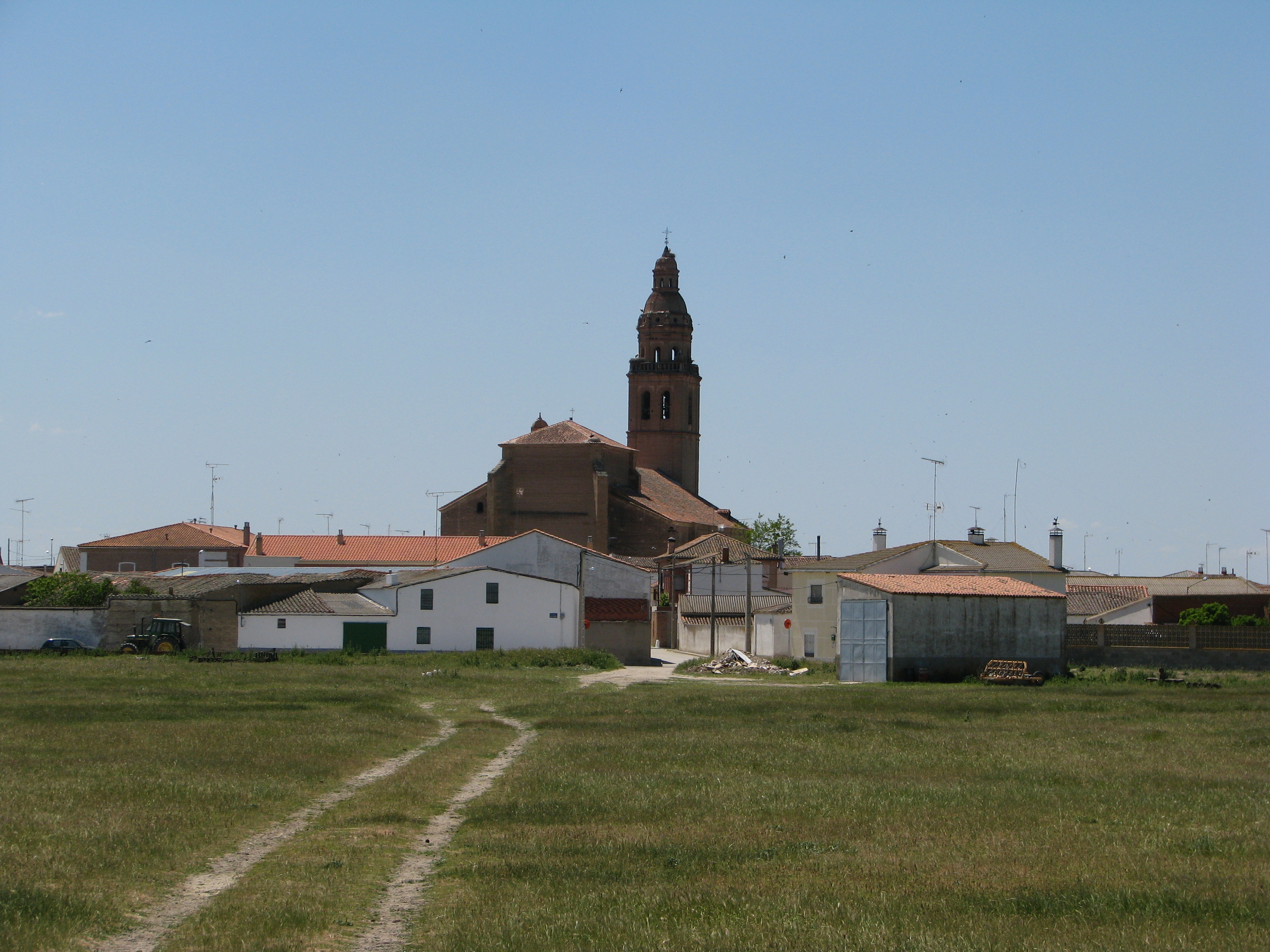 Vista de la iglesia de Palaciosrubios y la propa localidad, (Salamanca, Castilla y León, España).